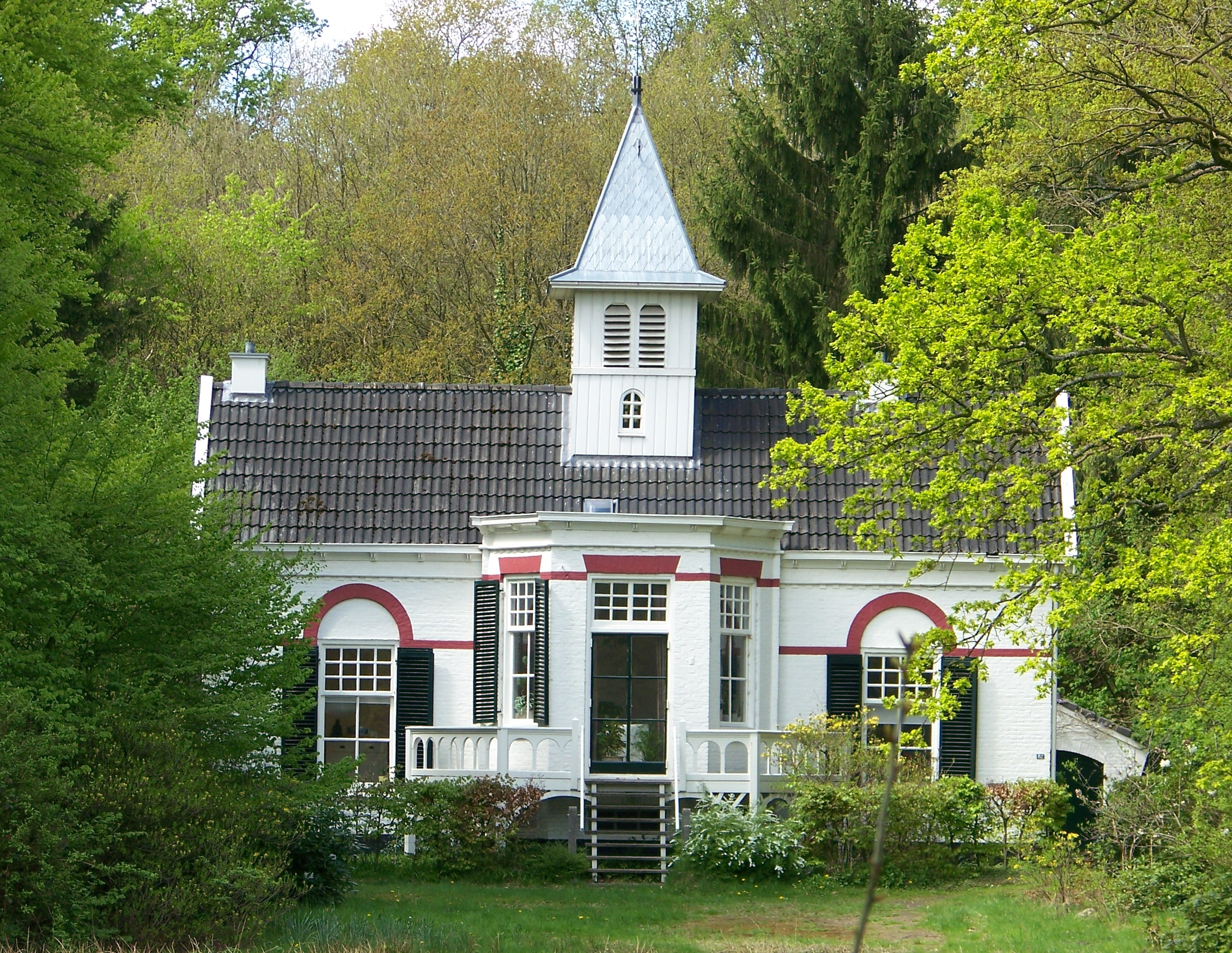 De Eerste Steen aan de Beilerstraat 82 in Assen, is een Rijksmonument.